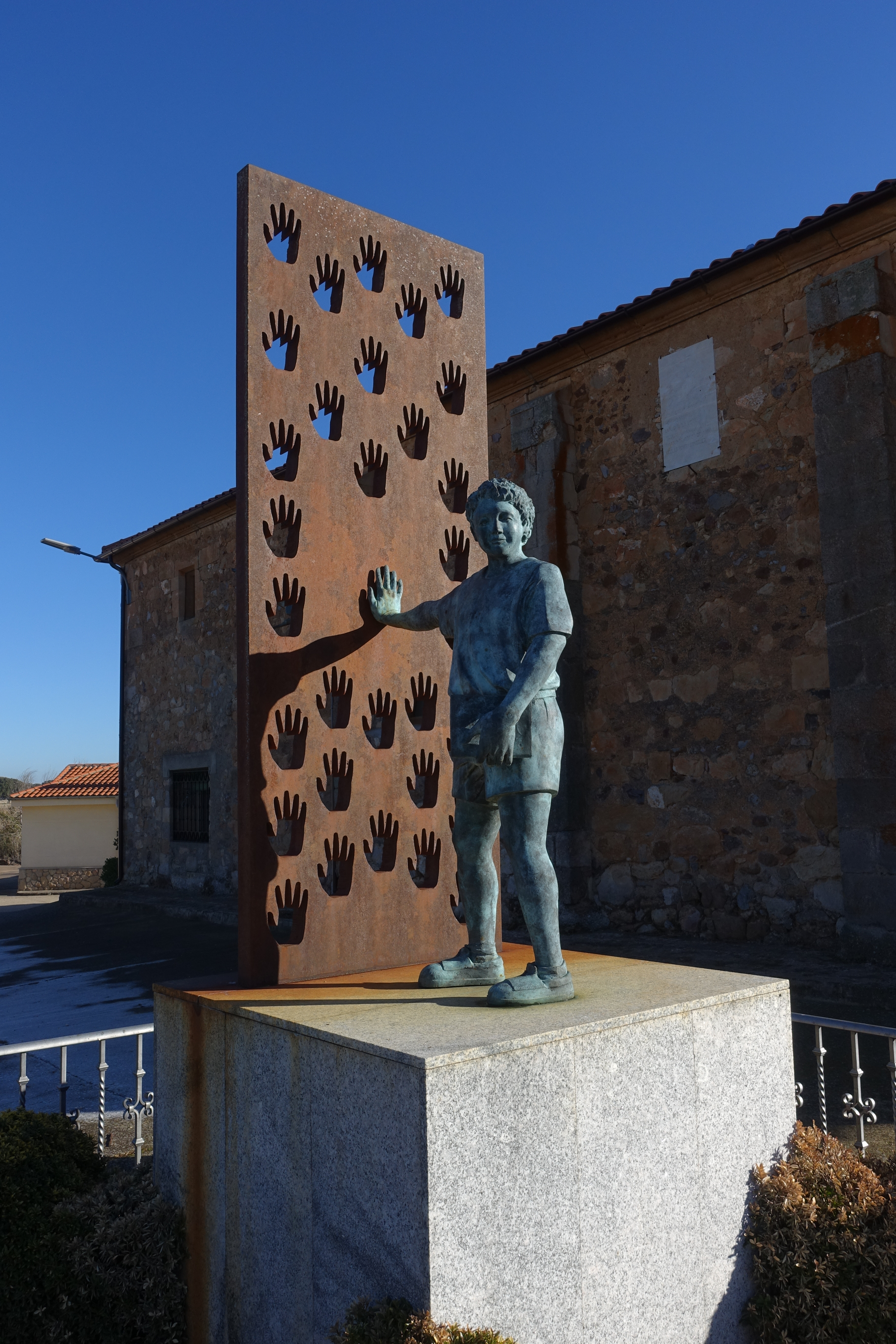 Monumento en memoria del accidente de Muñoz, La Sagrada (Salamanca, España).